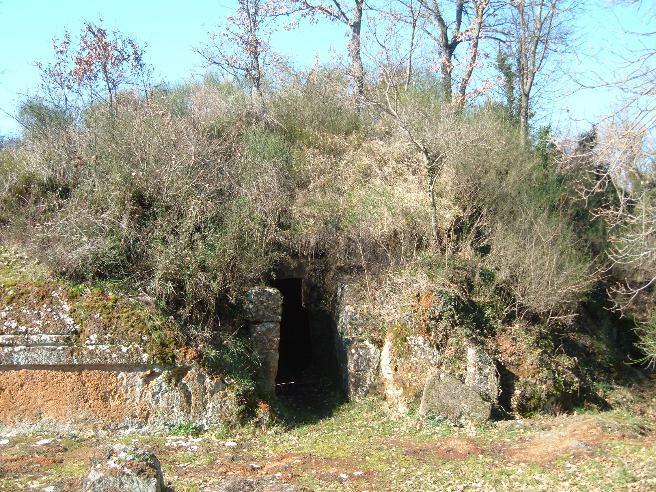 Tomba detta Cima, nella necropoli di San Giuliano, nel parco regionale di Marturanum (territorio di Barbarano Romano).